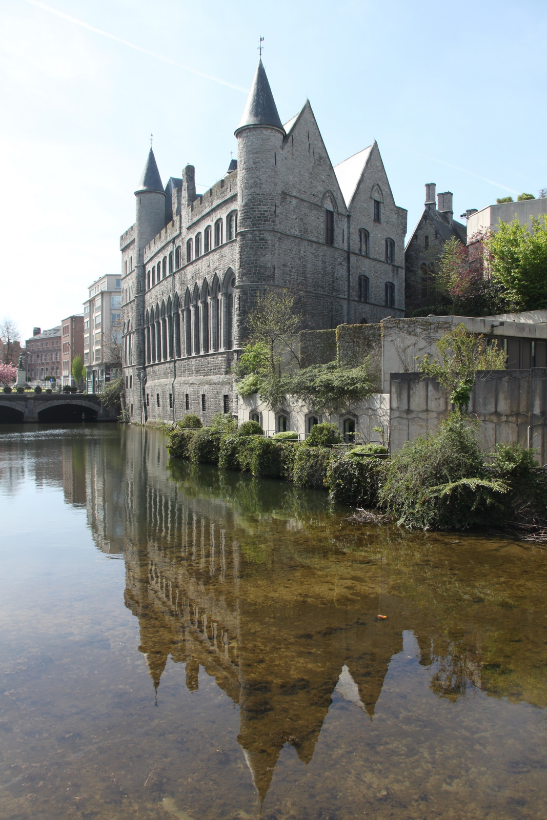 Ghent, Belgium on 2011-04-10